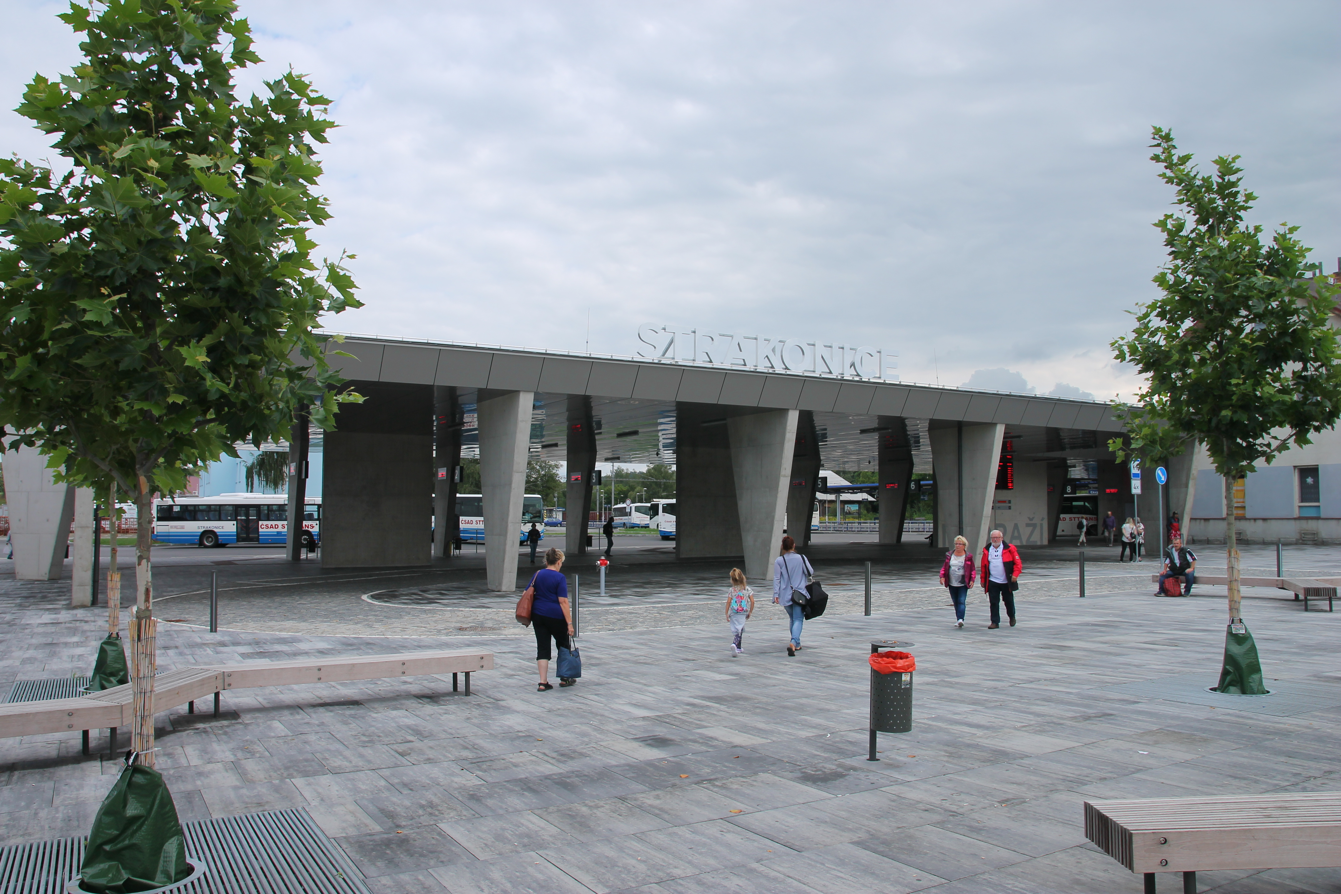 Nové autobusové nádraží ve Strakonicích – v provozu od prosince 2018